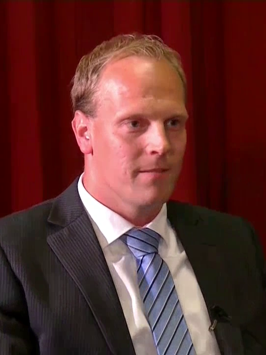 Screenshot van Roy van Aalst uit een video van wijZijn-ONpartijdig & Politiek Correct.